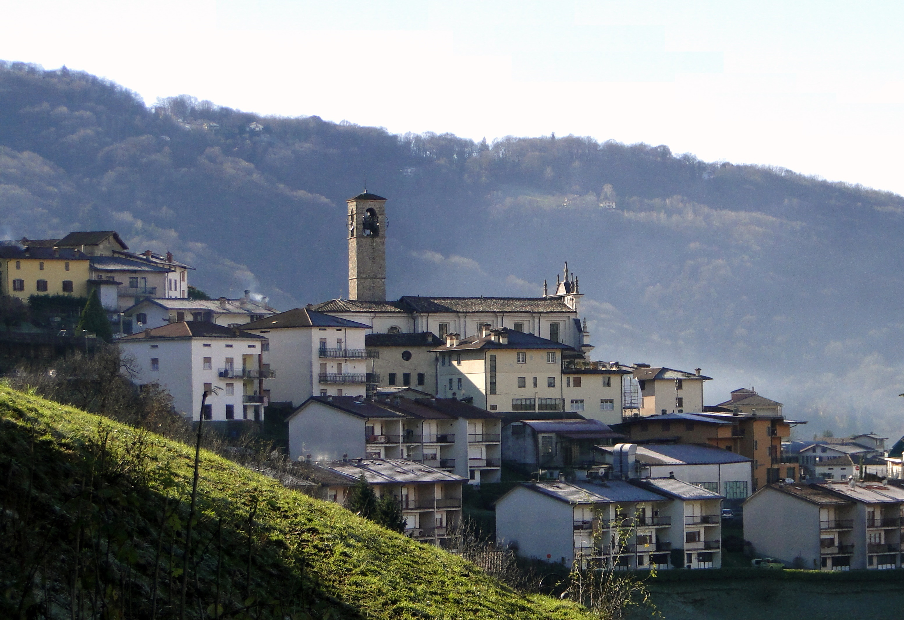 Panorama di Peia (BG). Italy